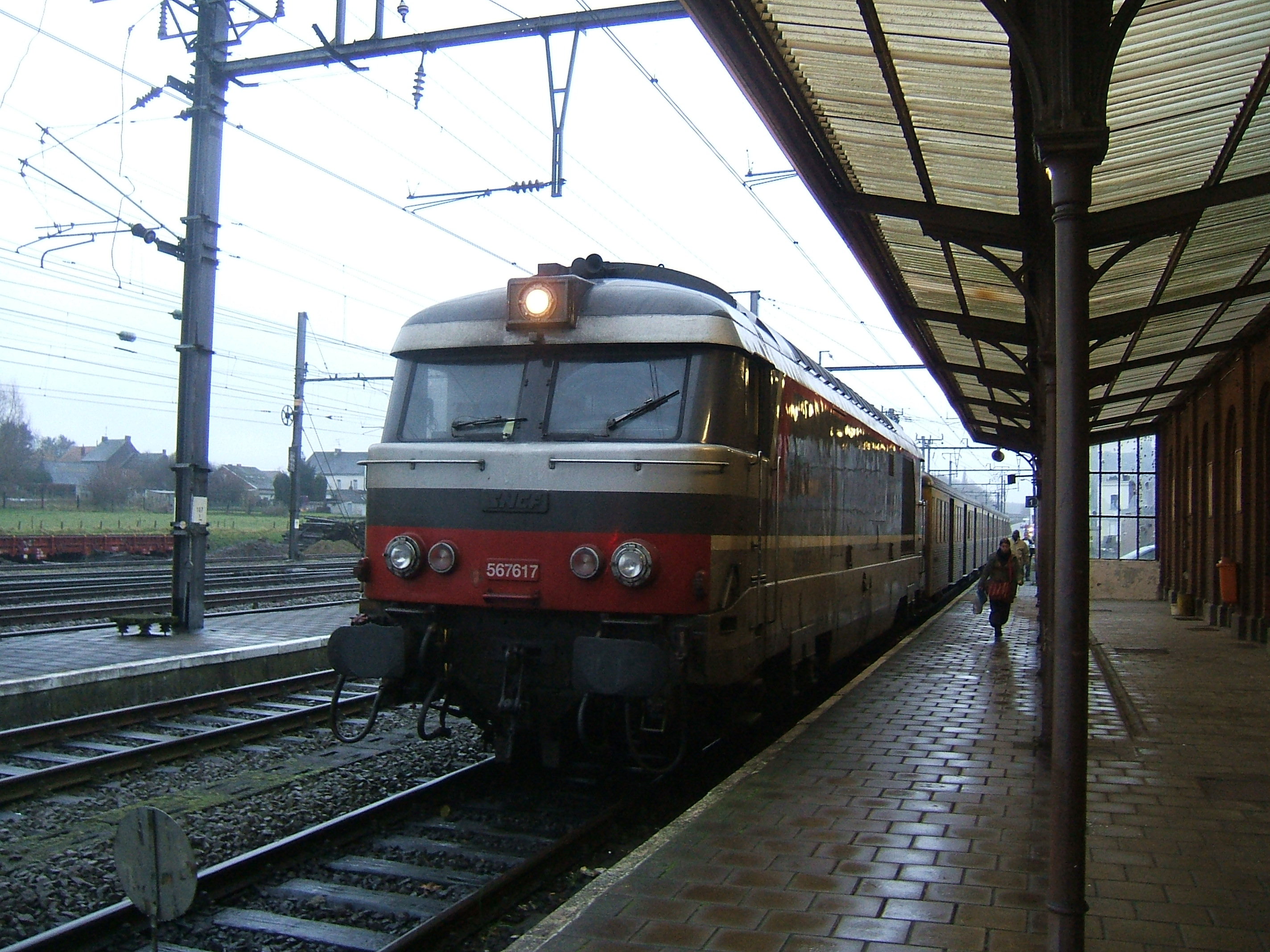 Train français en gare de Quévy (Belgique).